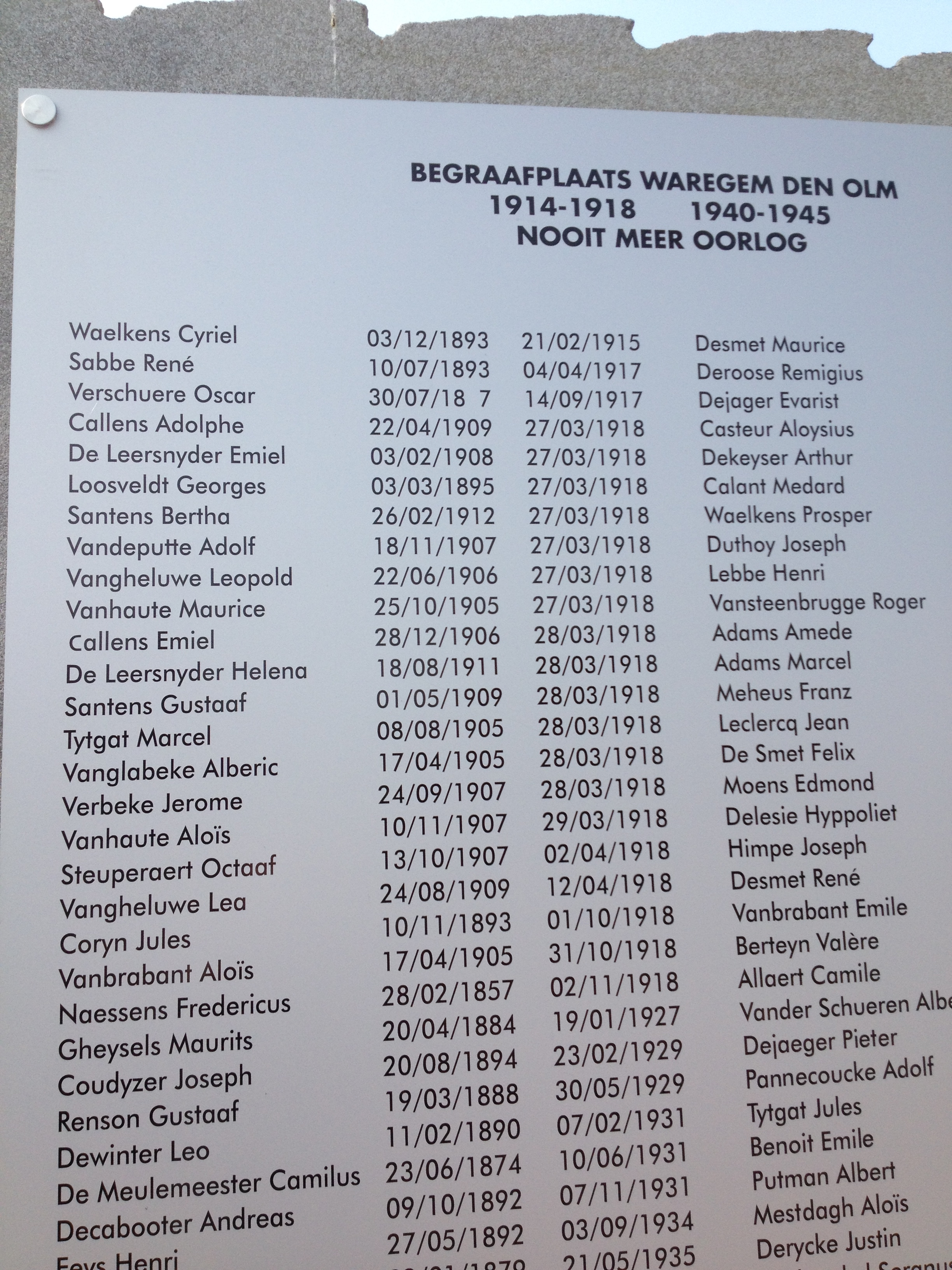 Gedenkplaats oorlogsslachtoffers waaronder de kinderen uit Nieuwenhove